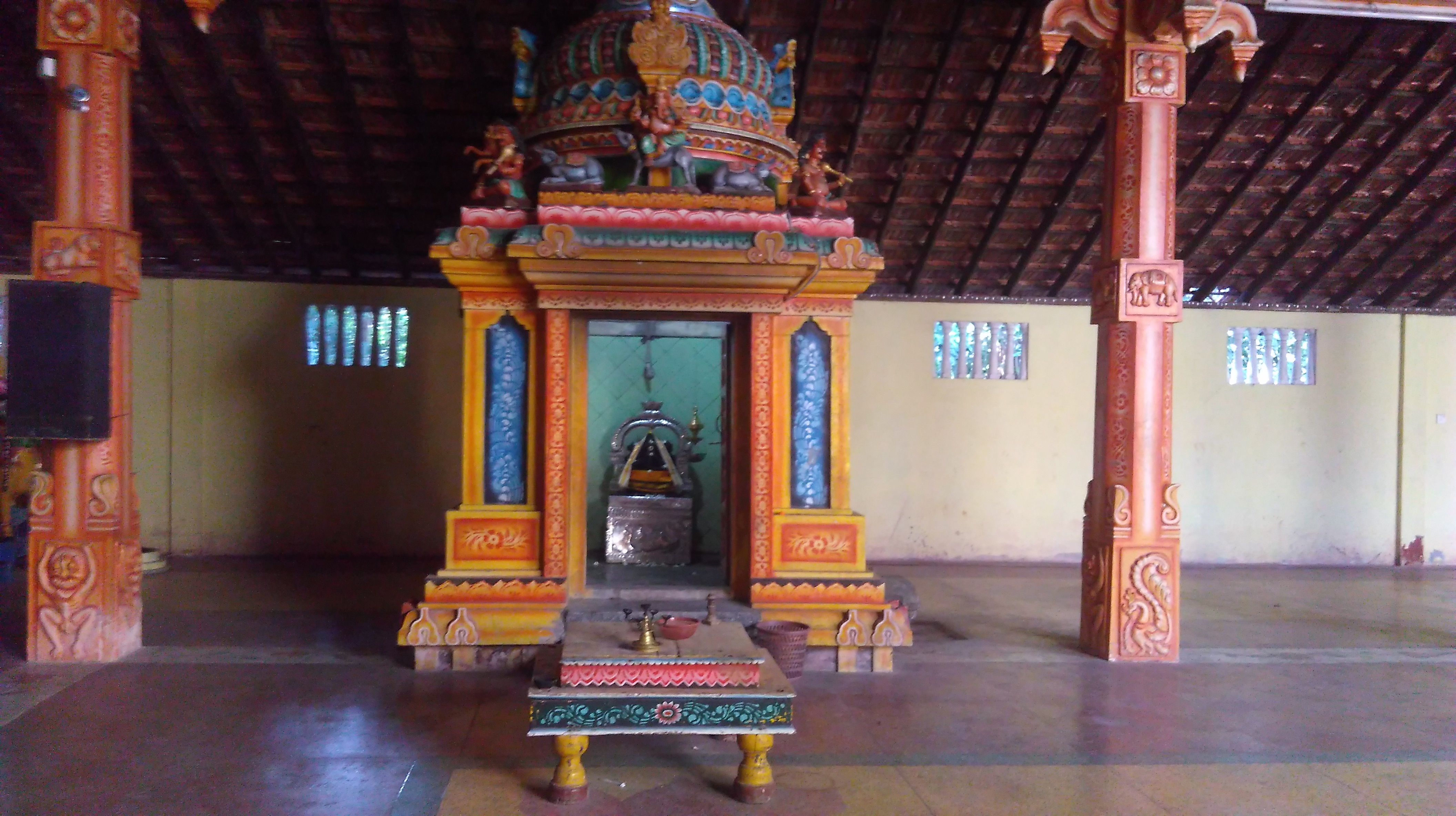 விநாயகர்